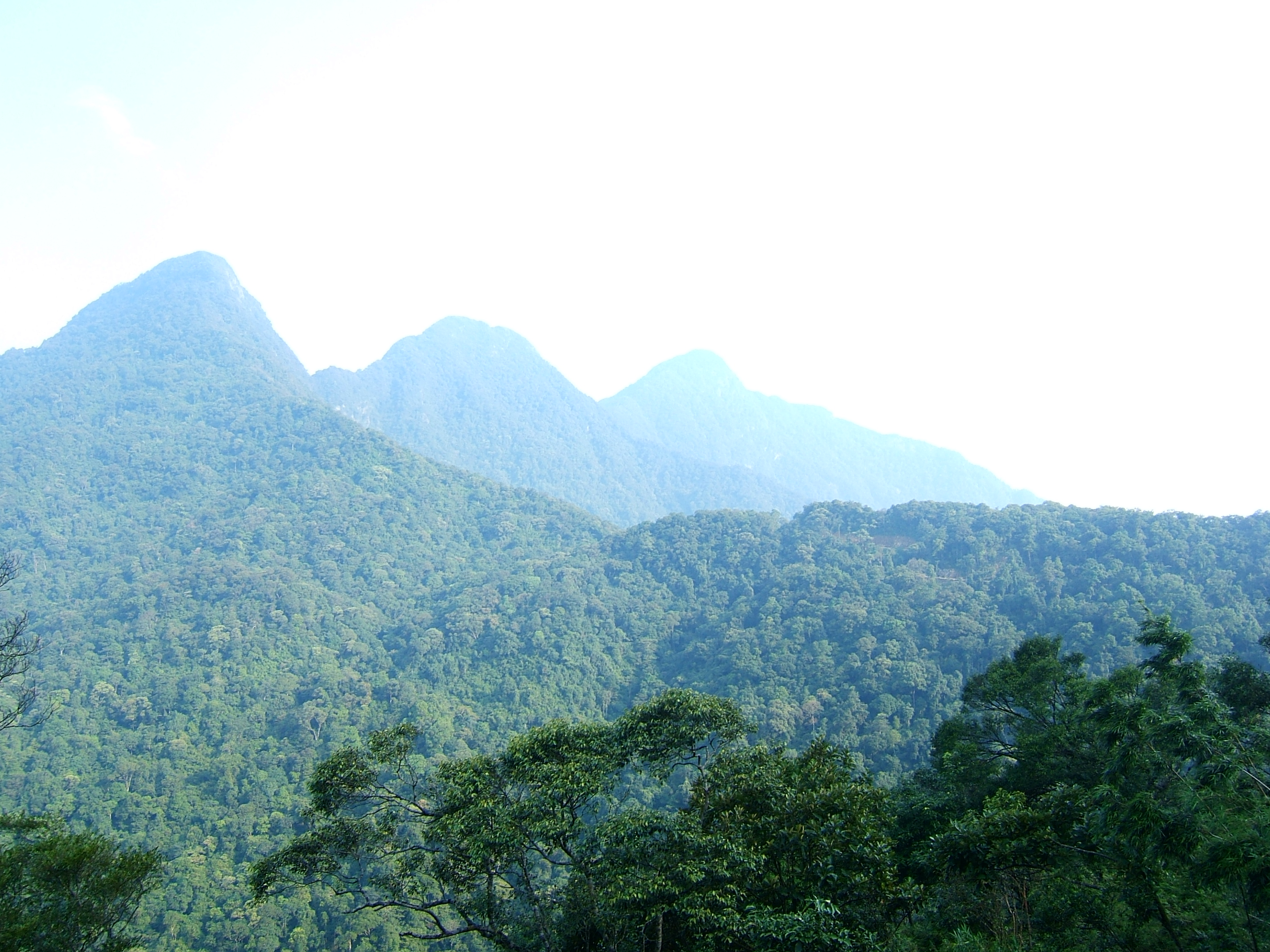 Tam Dao mountain range (dãy núi Tam Đảo), Vietnam